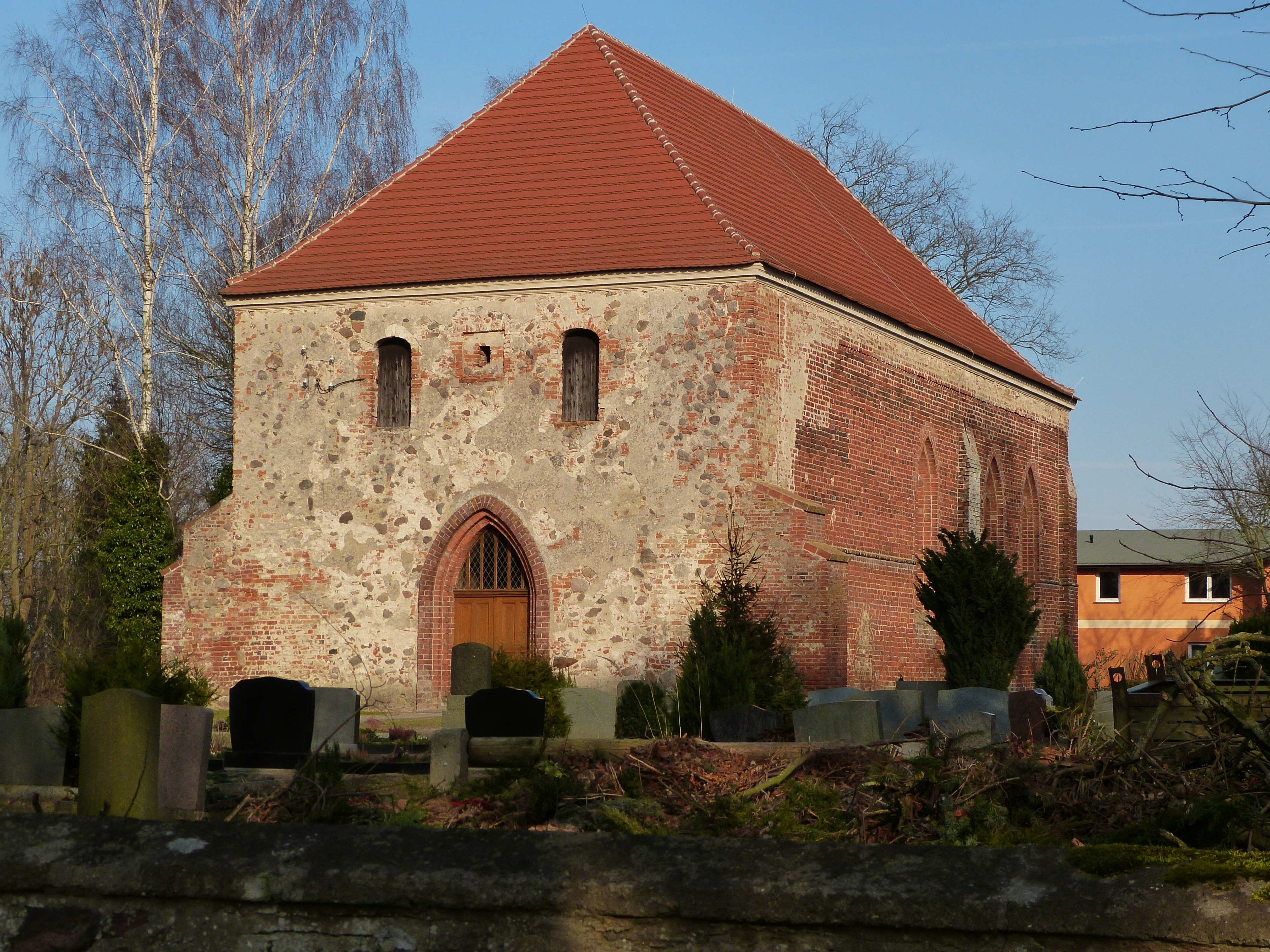 Kirche in Gramzow, Gemeinde Krusenfelde, Ansicht von Südwesten